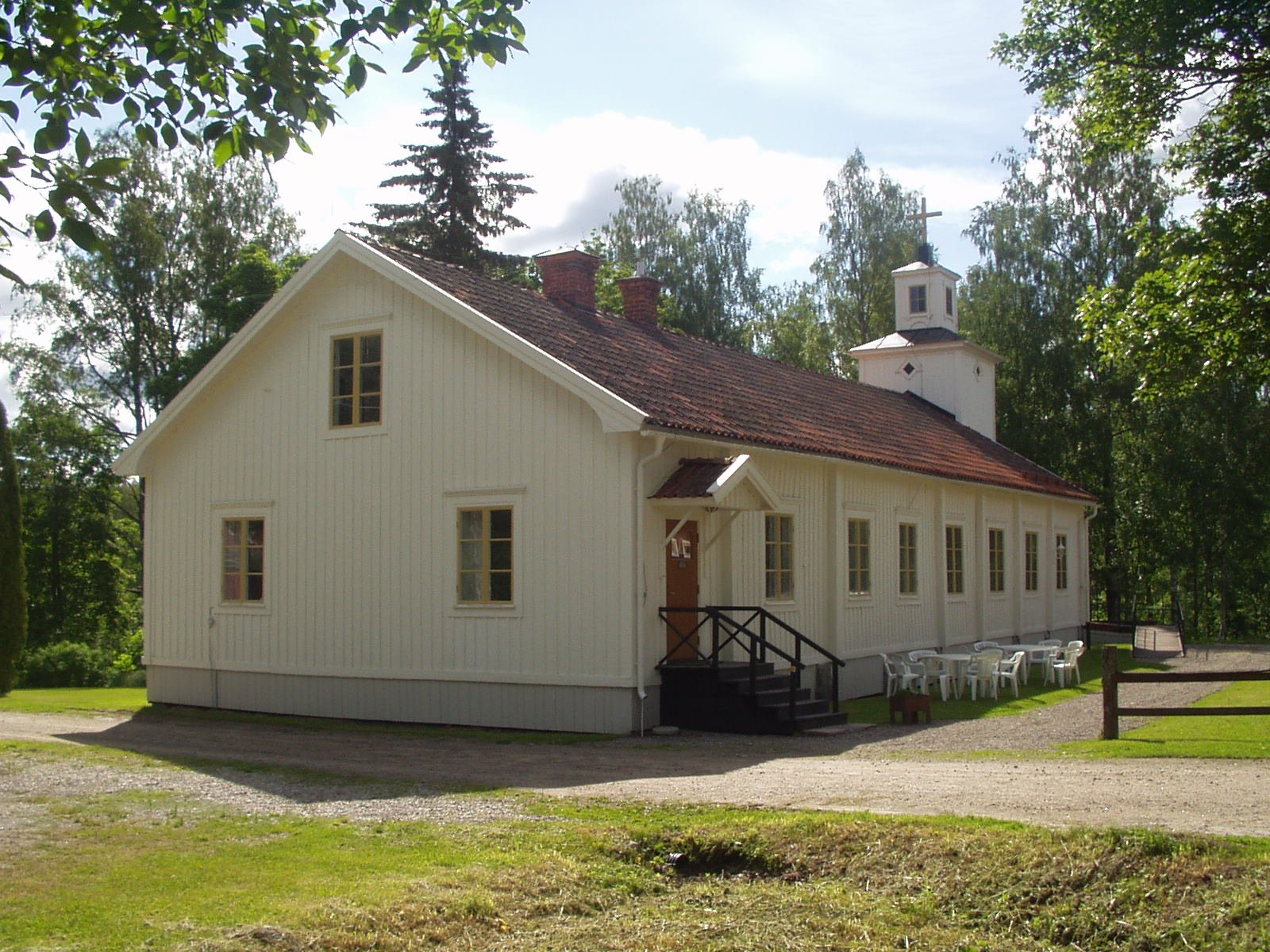 Nianfors kyrka